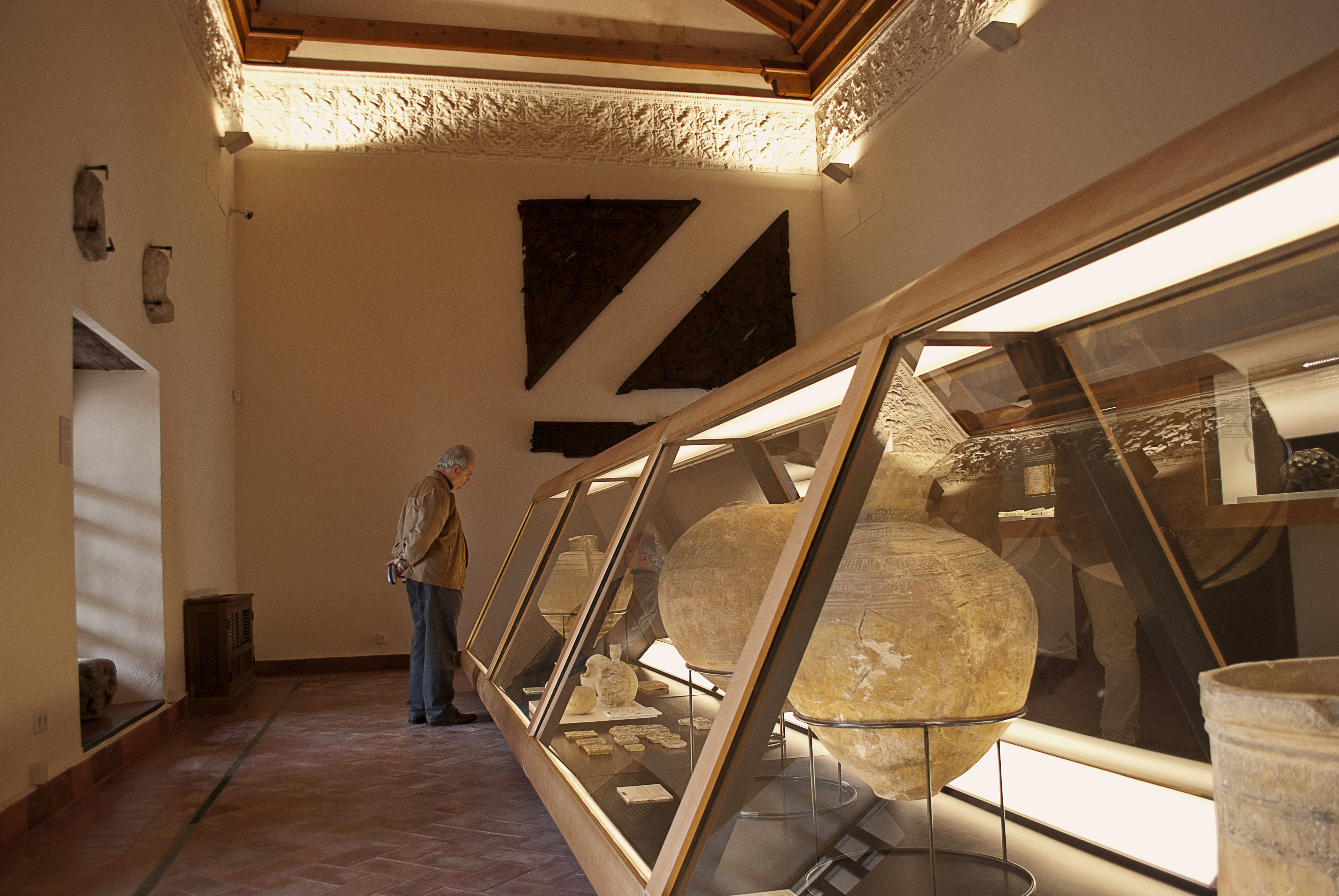 Centro del Mudéjar. Palacio de los marqueses de la Algaba. (Sevilla, España)